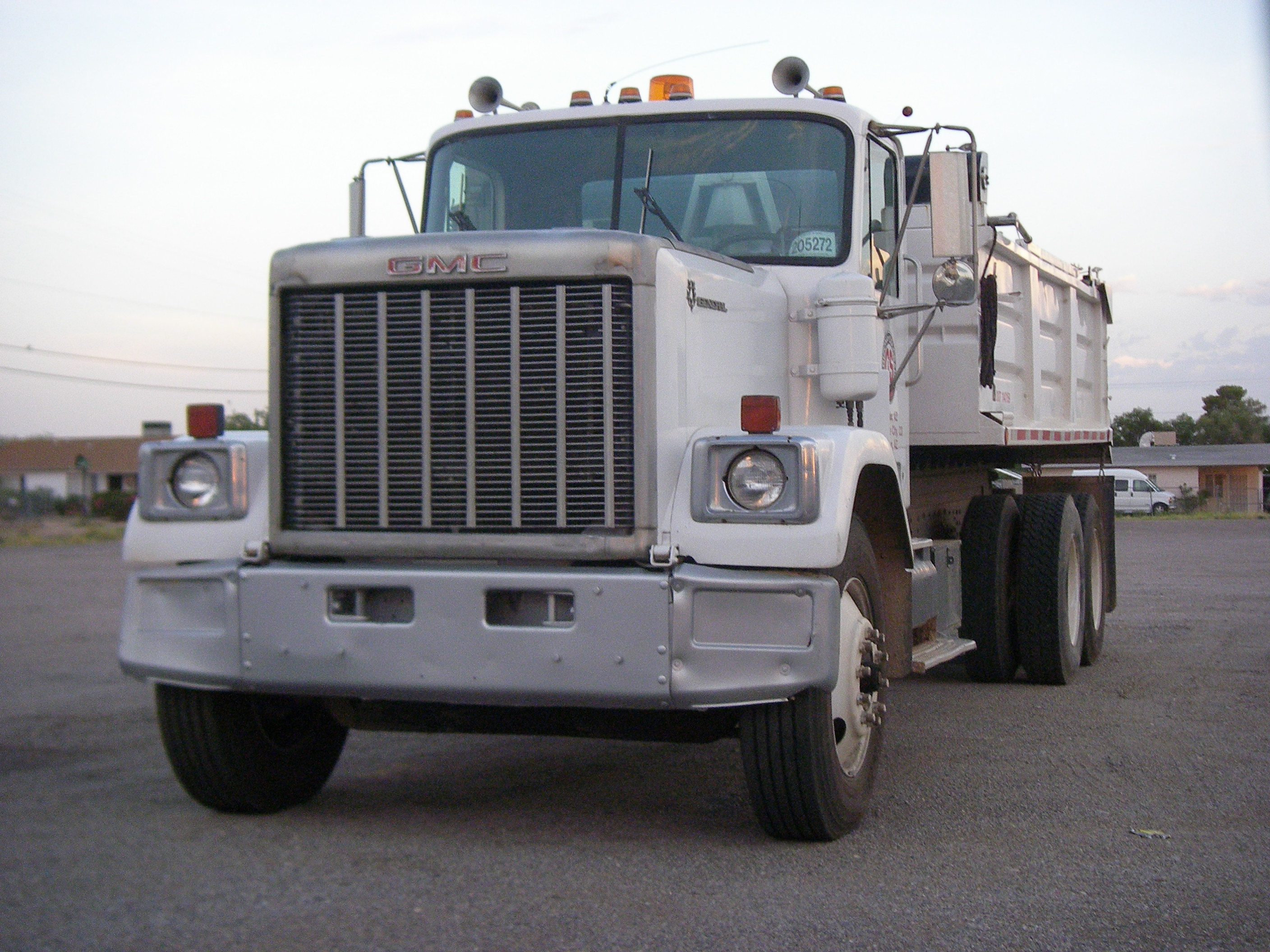 GMC General